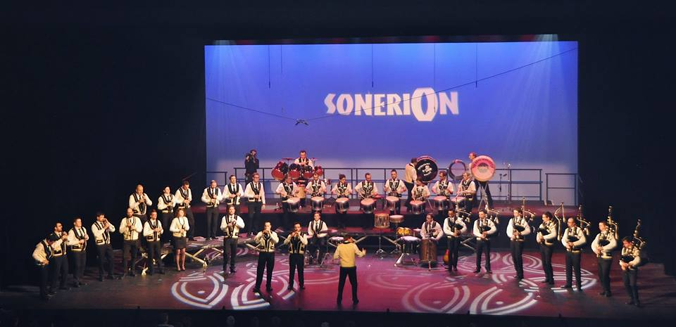 Championnat National des Bagadoù, Brest 2015